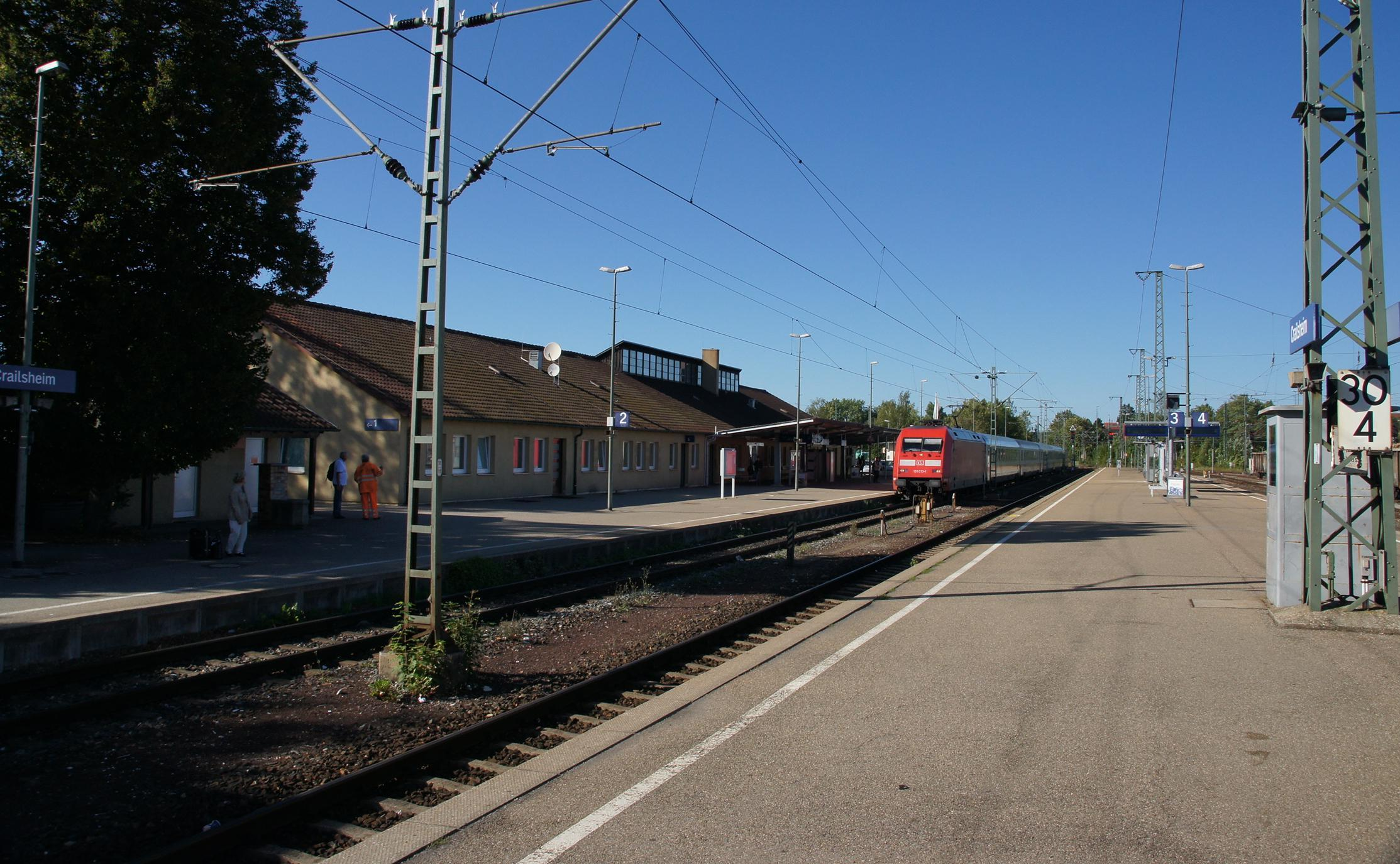 Bahnhof Crailsheim mit IC nach Karlsruhe